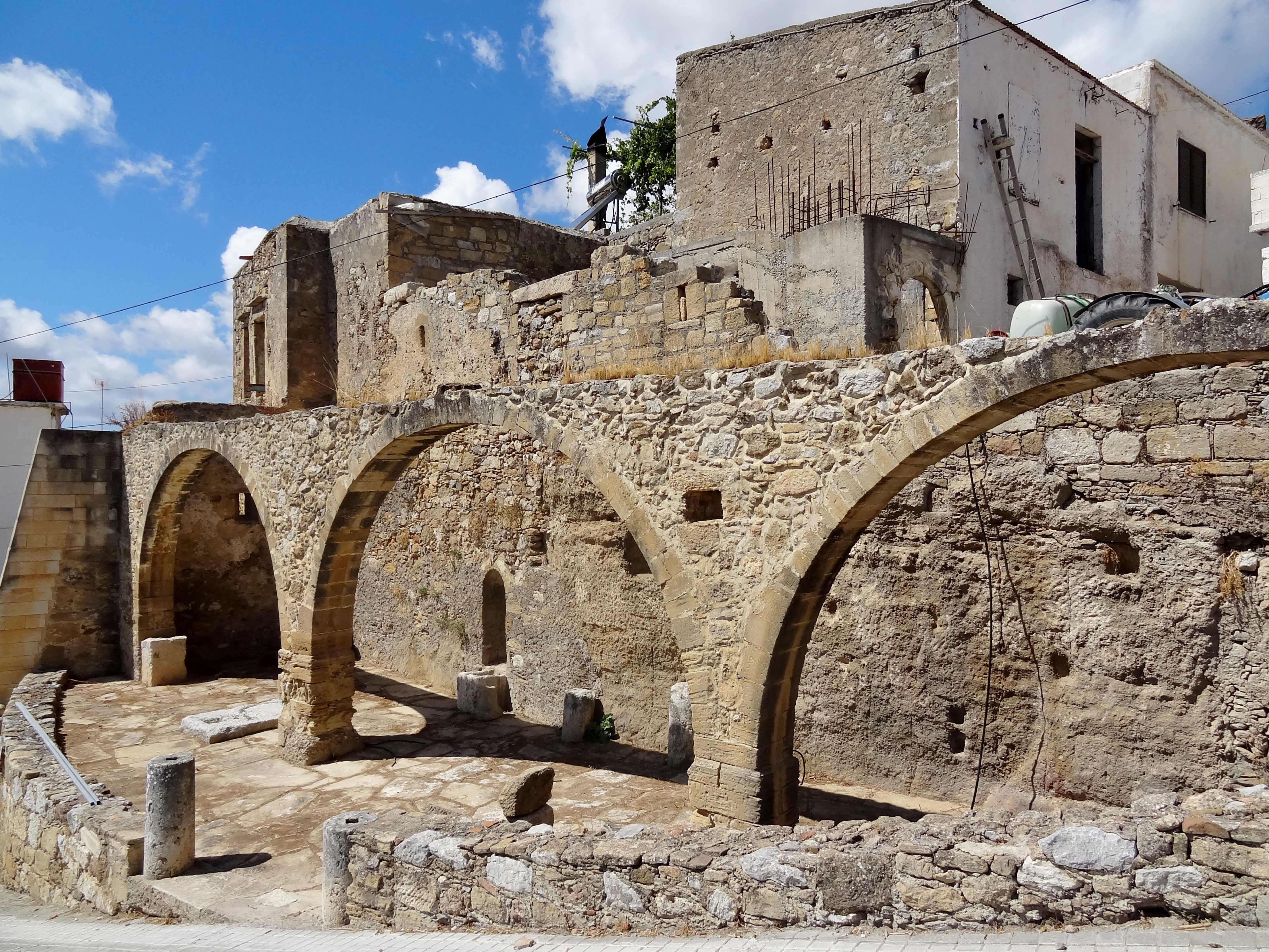 Überreste des antiken Polyrrhenia (Πολυρρηνία), Gemeinde Kissamos, Regionalbezirk Chania, Kreta, Griechenland